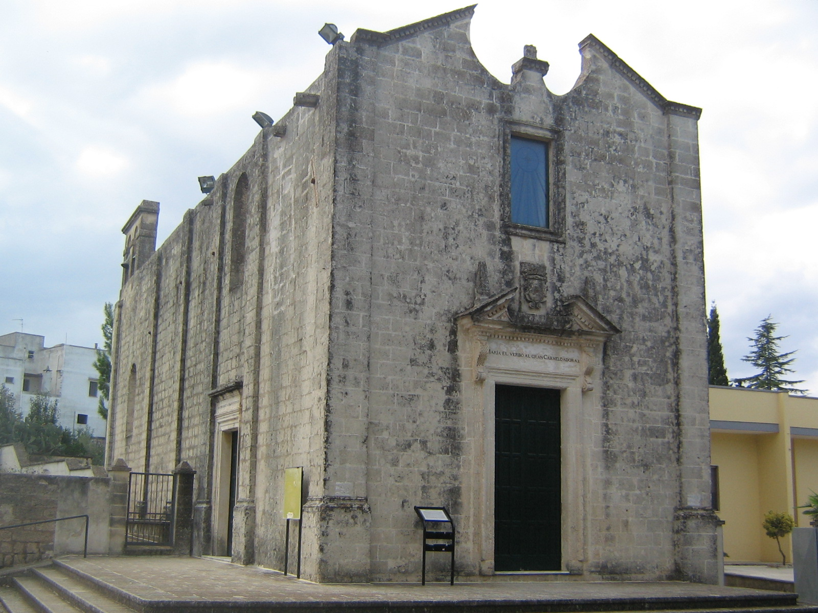 Caprarica di Lecce Chiesa del Carmine